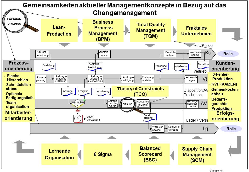 Abbildung 2: Gemeinsamkeiten aktueller Managementkonzepte in Bezug auf das Changemanagement